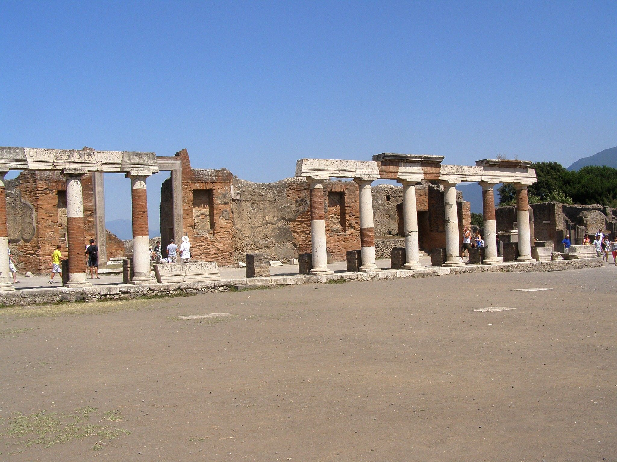 Nápis vyrytý do architrávu stĺporadia pred budovou Emachie hlása, že Eumachia, Luciova dcéra a Venušina verejná kňažka, menom svojím a menom svojho syna M. Numistria Frontona vystavala vchod, kryptu a stĺporadie na vlastné náklady a zasvätila ich bohyniam Concordii a Pietas Auguste